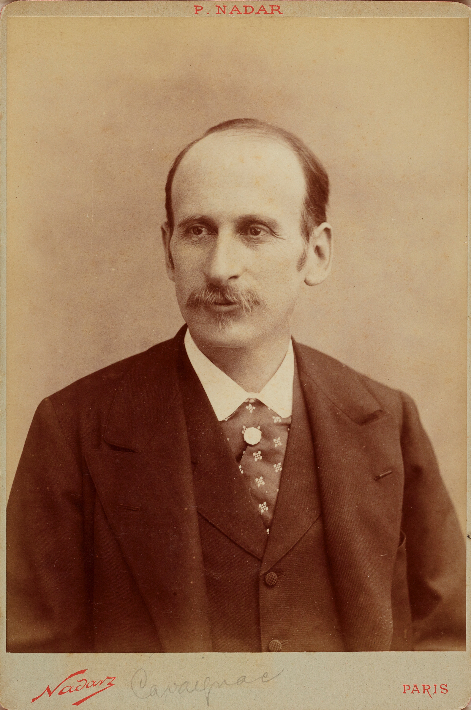 Godefroy Cavaignac photographié par Nadar, musée de Bretagne, collection Arts graphiques.